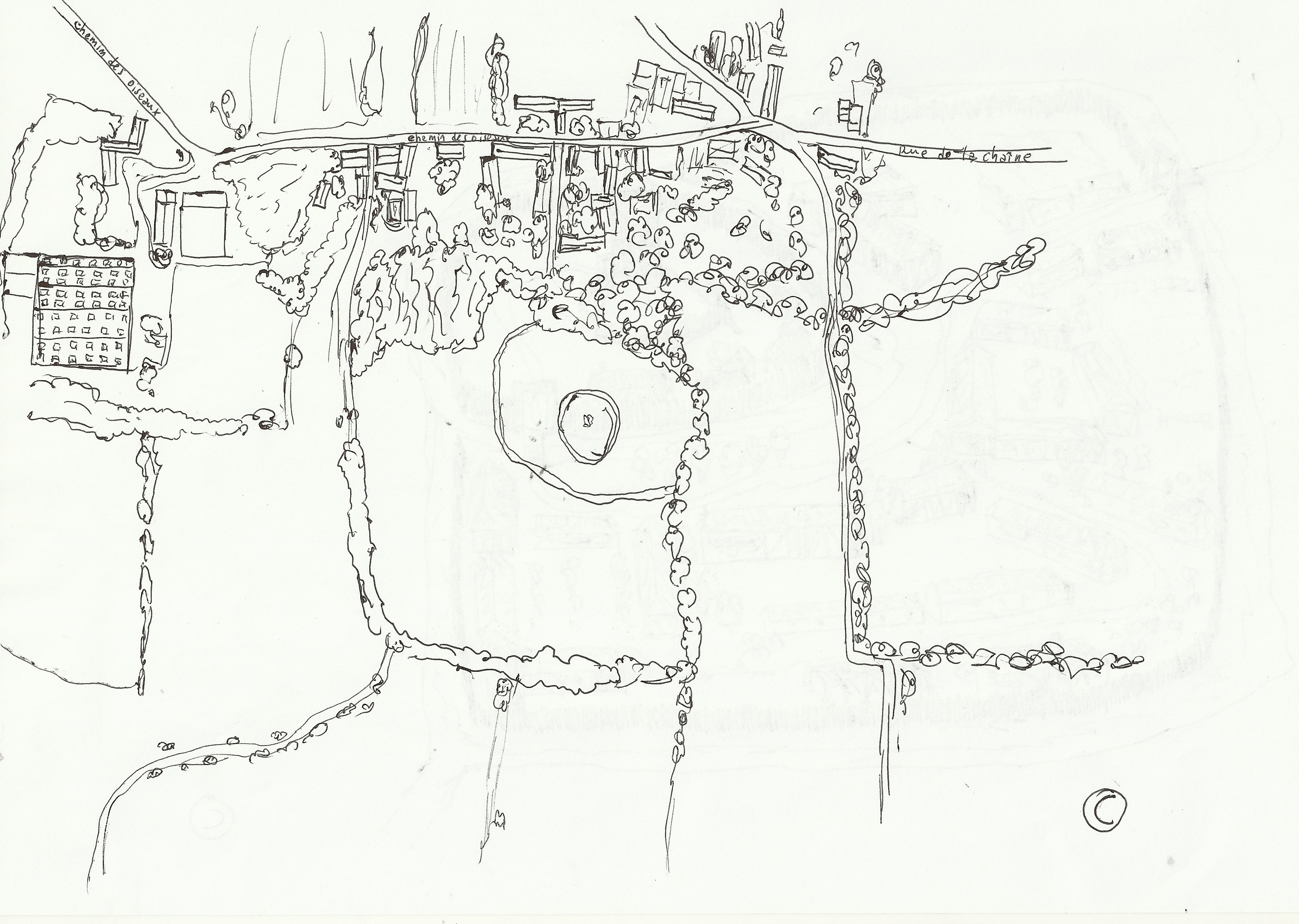 Croquis de la vue aérienne de la Chaîne à Longeville sur mer, et sa motte castrale du haut moyen age.